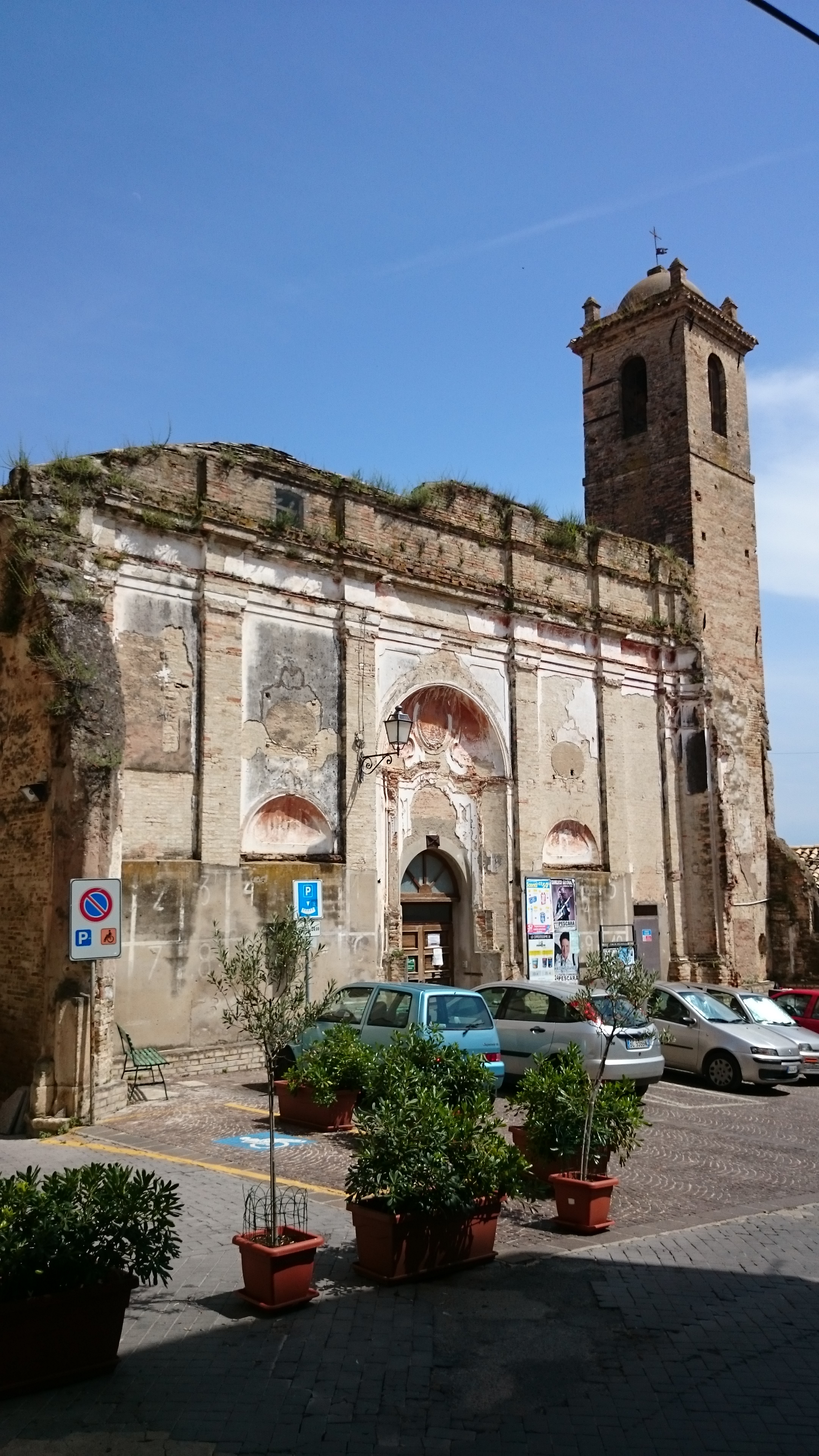 Loreto Aprutino